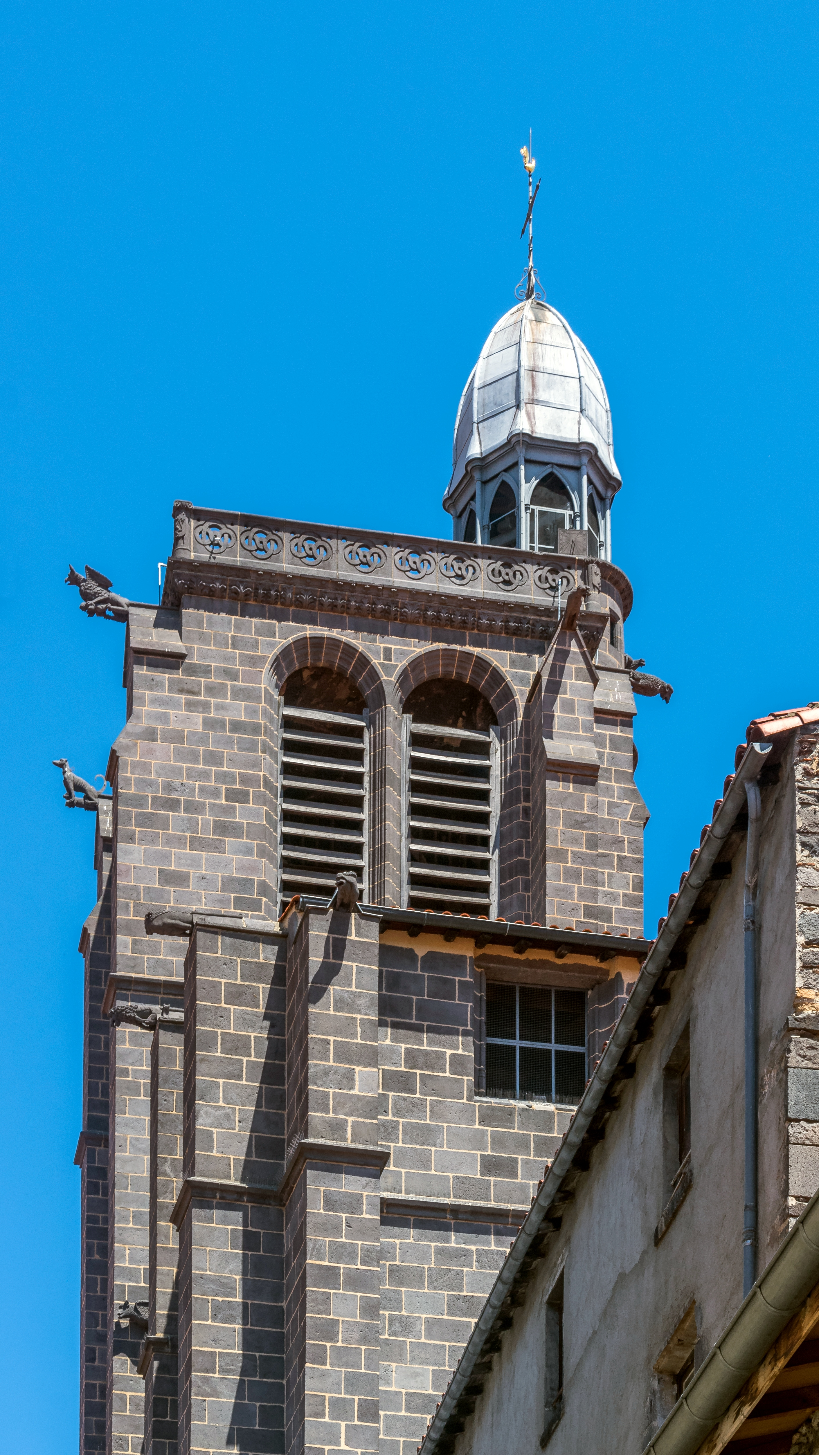 Clocher d'Église Notre-Dame de Prospérité à Clermont-Ferrand, Puy-de-Dôme, France .